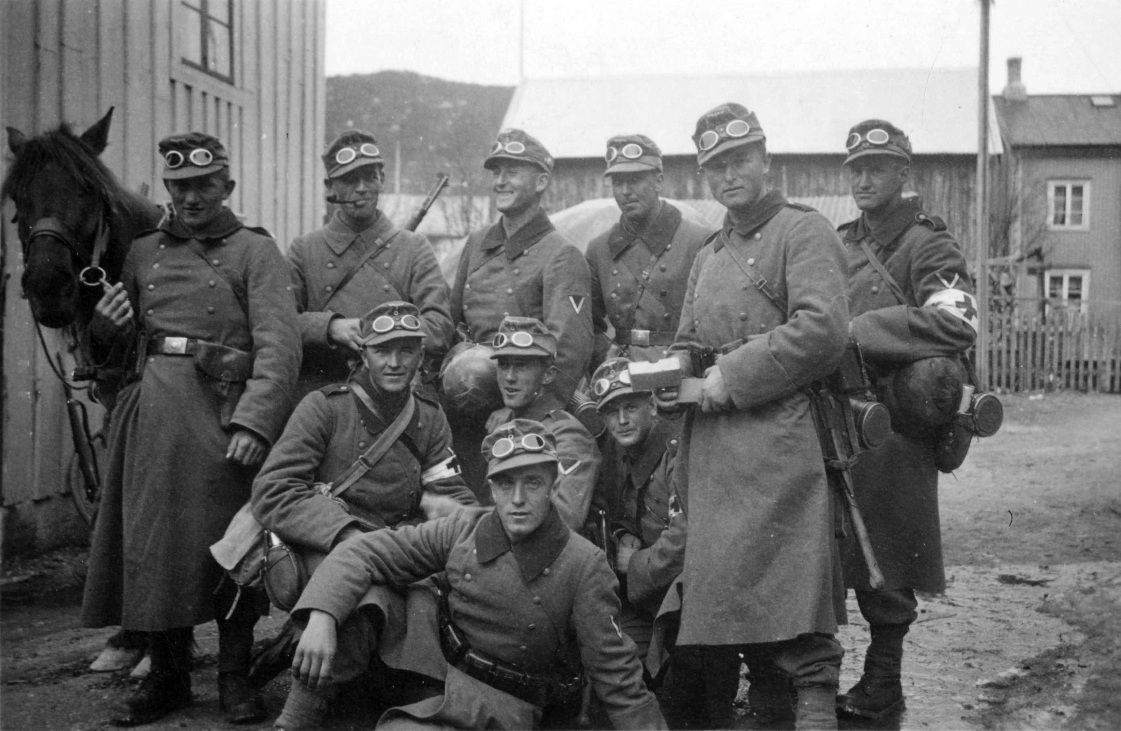 Bergjegere fra 6. Kompani i Mo i Rana, Otto Erlacher fremst Tittel / Title: Bergjegere fra 6 kompani i Mo i Rana. Dato / Date: Ukjent/Unknown Fotograf / Photographer: Karl Marth Sted / Place: Mo i Rana, Nordland, Norge Eier / Owner Institution: Arkiv i Nordland Lenke / Link: Arkiv i Nordland Arkivreferanse /Archive reference: AIN.NA143.0169 Fra Dag Skogheims Privatarkiv Tekst bak på bildet: Beim vormarsch muss schon in Mo? Sein. Die männer tragen schon erbeutete englische sonnenbrillen. Ganz vorne Otto Erlacher!